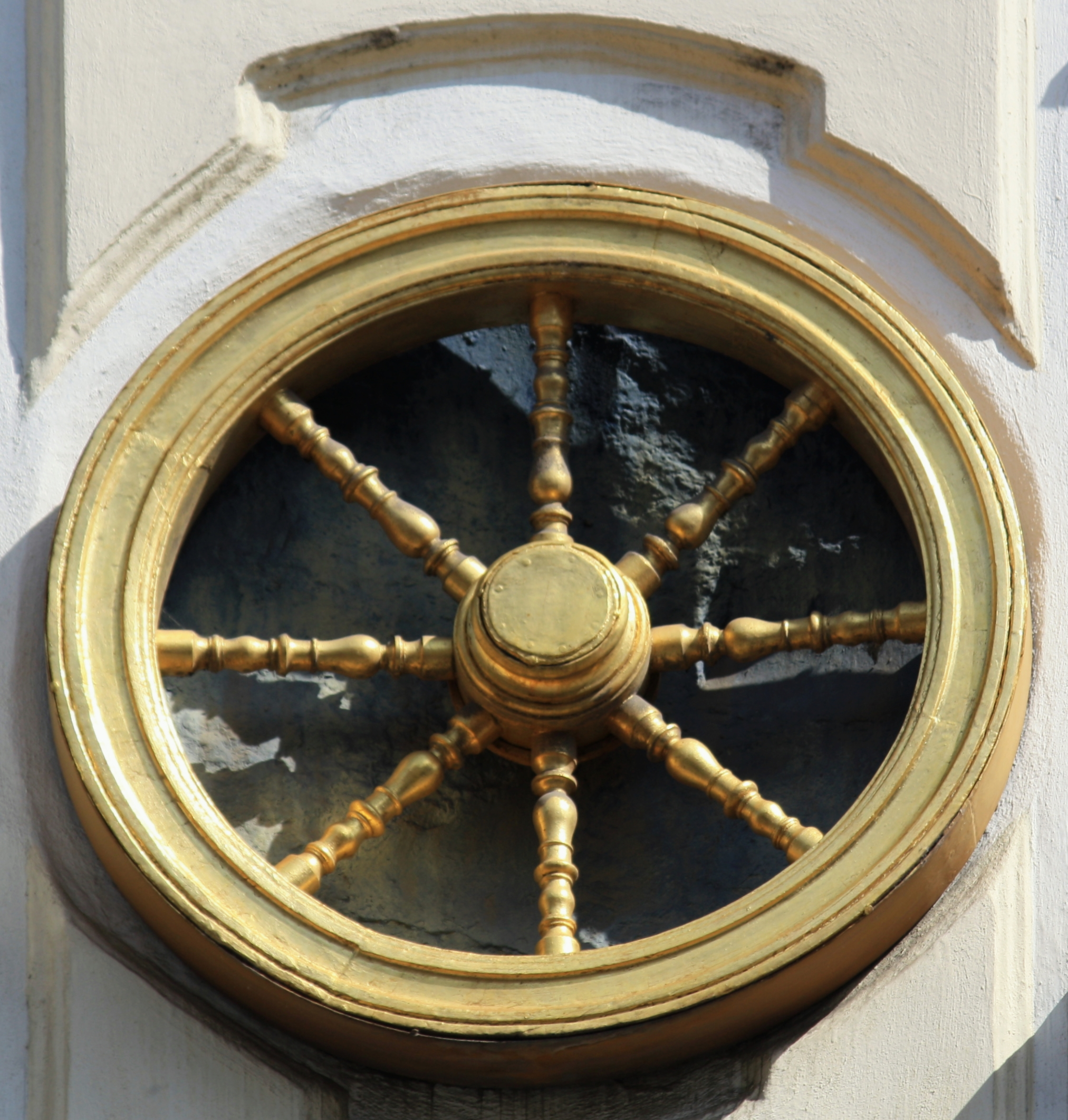 Praha, Staré Město - U Zlatého kola, domovní znamení